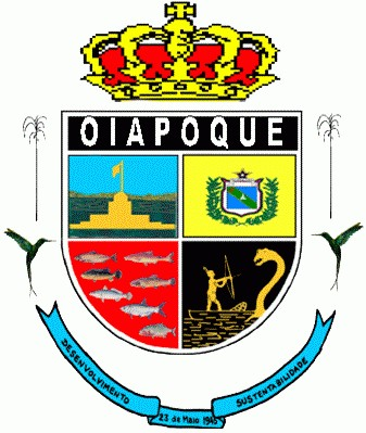 Brasão de Armas do município de Oiapoque - AP - Brasil.